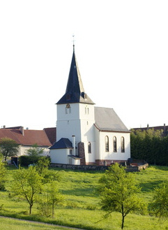 eglise de ringeldorf (bas-rhin, france)